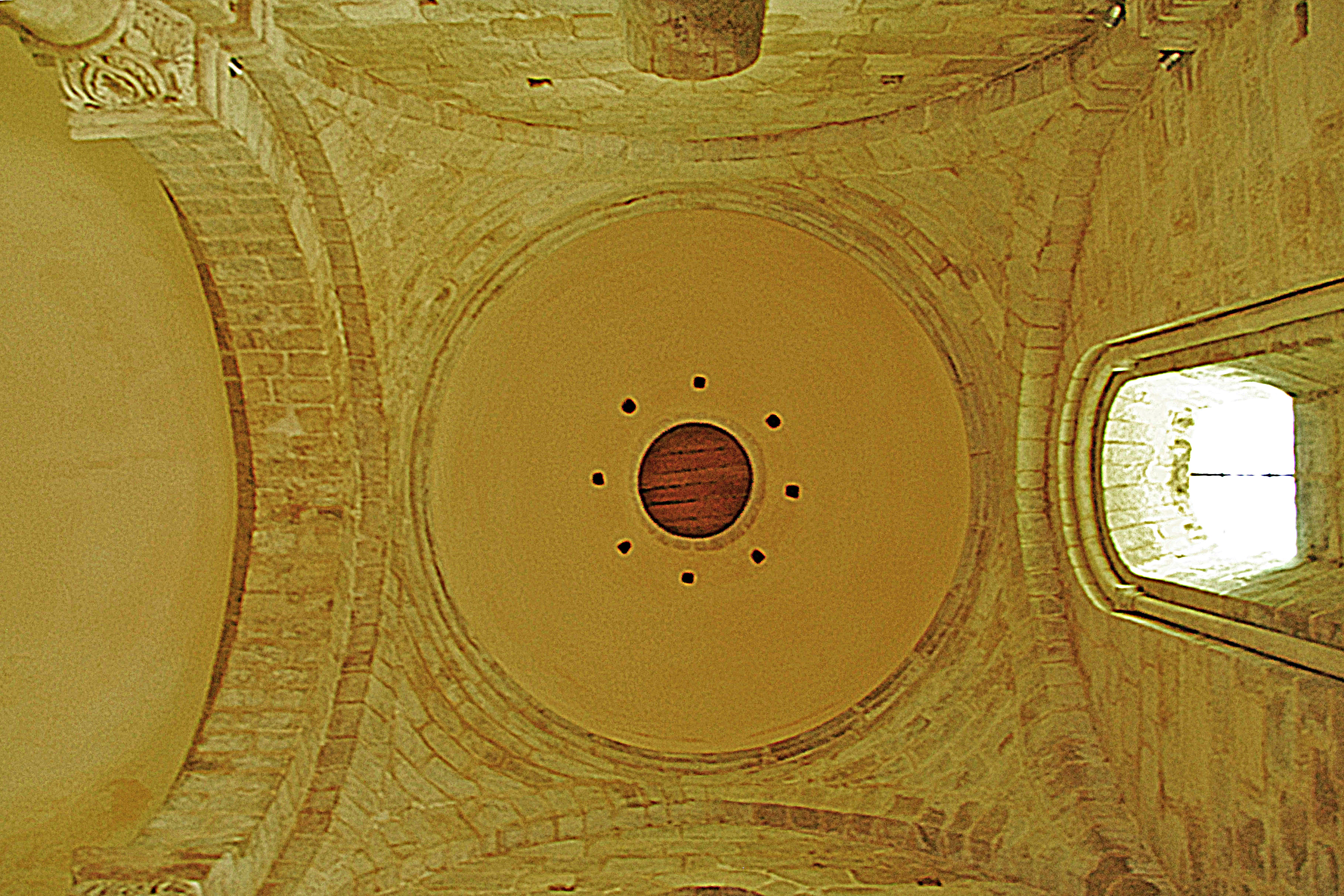 N.-D. de La Souterrain, Pendentifkuppel in Joch 1